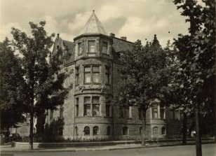 Hotel Kaiserhof in Düren, Nordrhein-Westfalen; 1902 als Villa erbaut, nach 1945 als Hotel genutzt, 1977 abgerissen